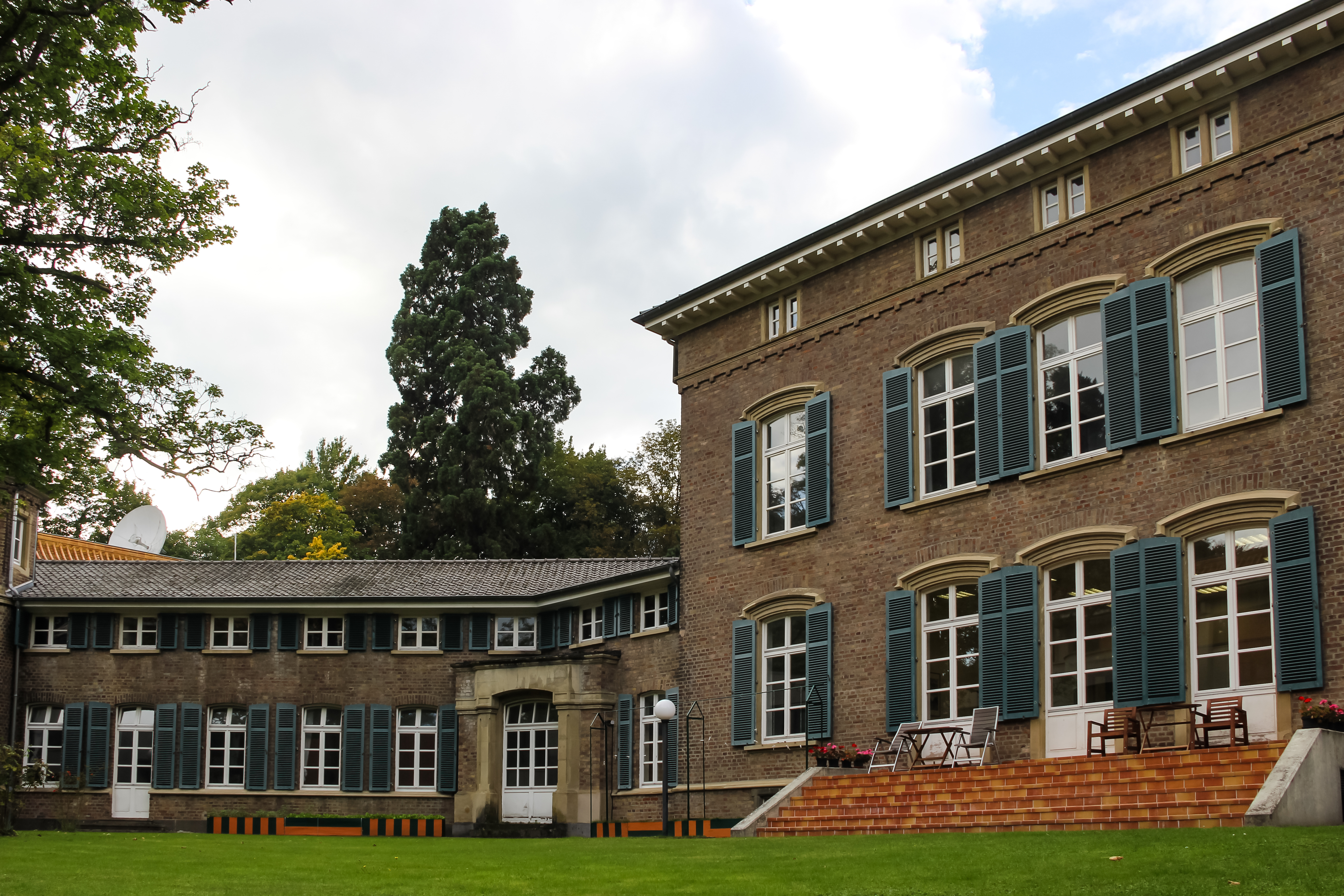 Außenstelle Bonn der Botschaft der Volksrepublik China, Kurfürstenallee 12, Bad Godesberg, Stadt Bonn; Schloss Rigal